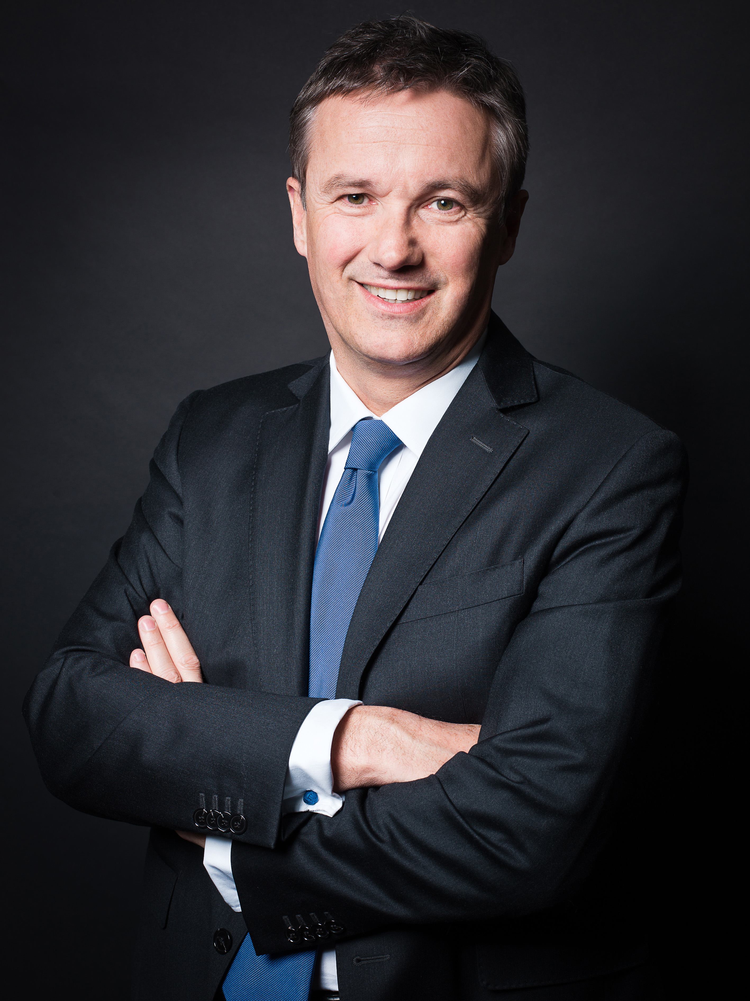 Portrait 1